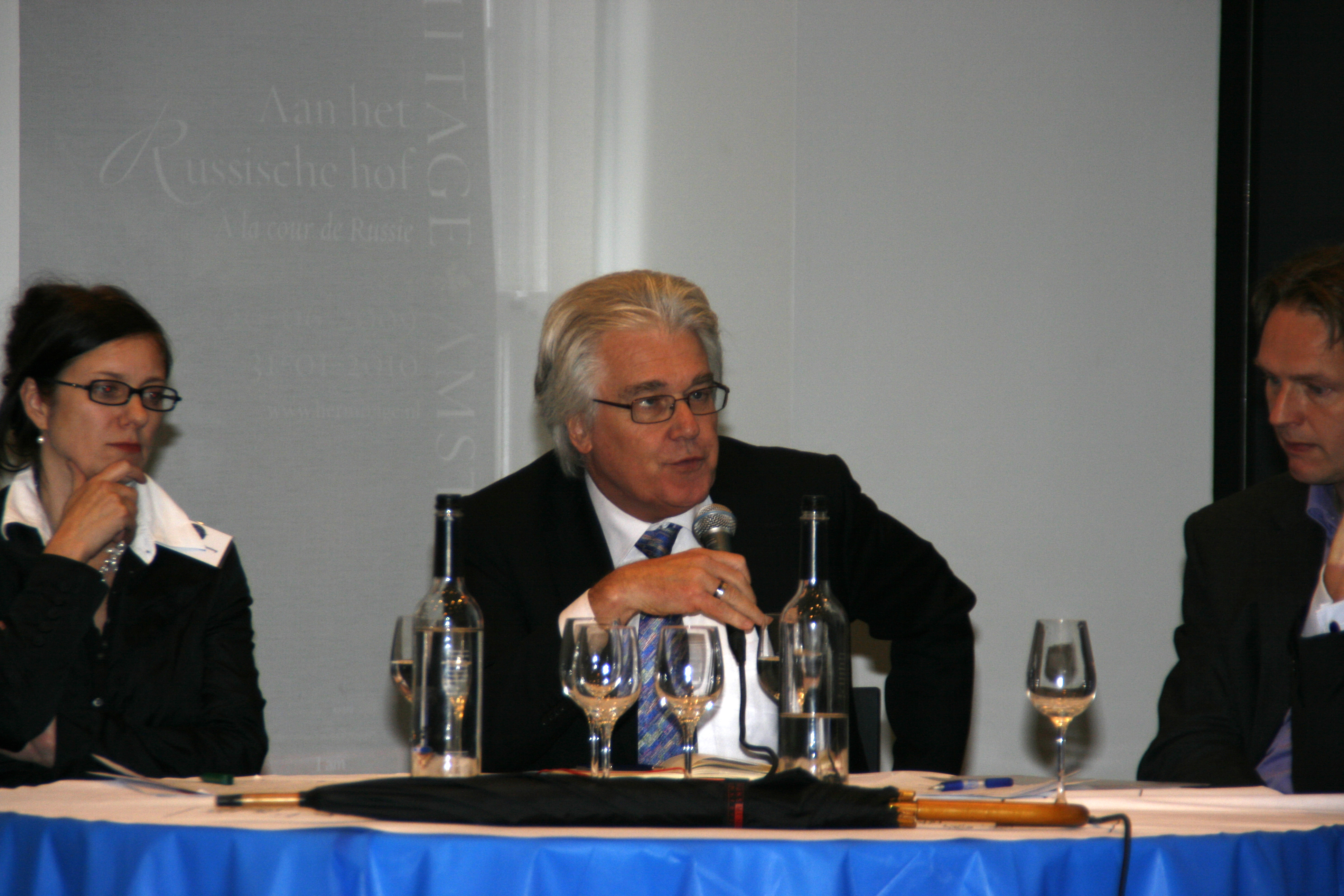 Bas Savenije